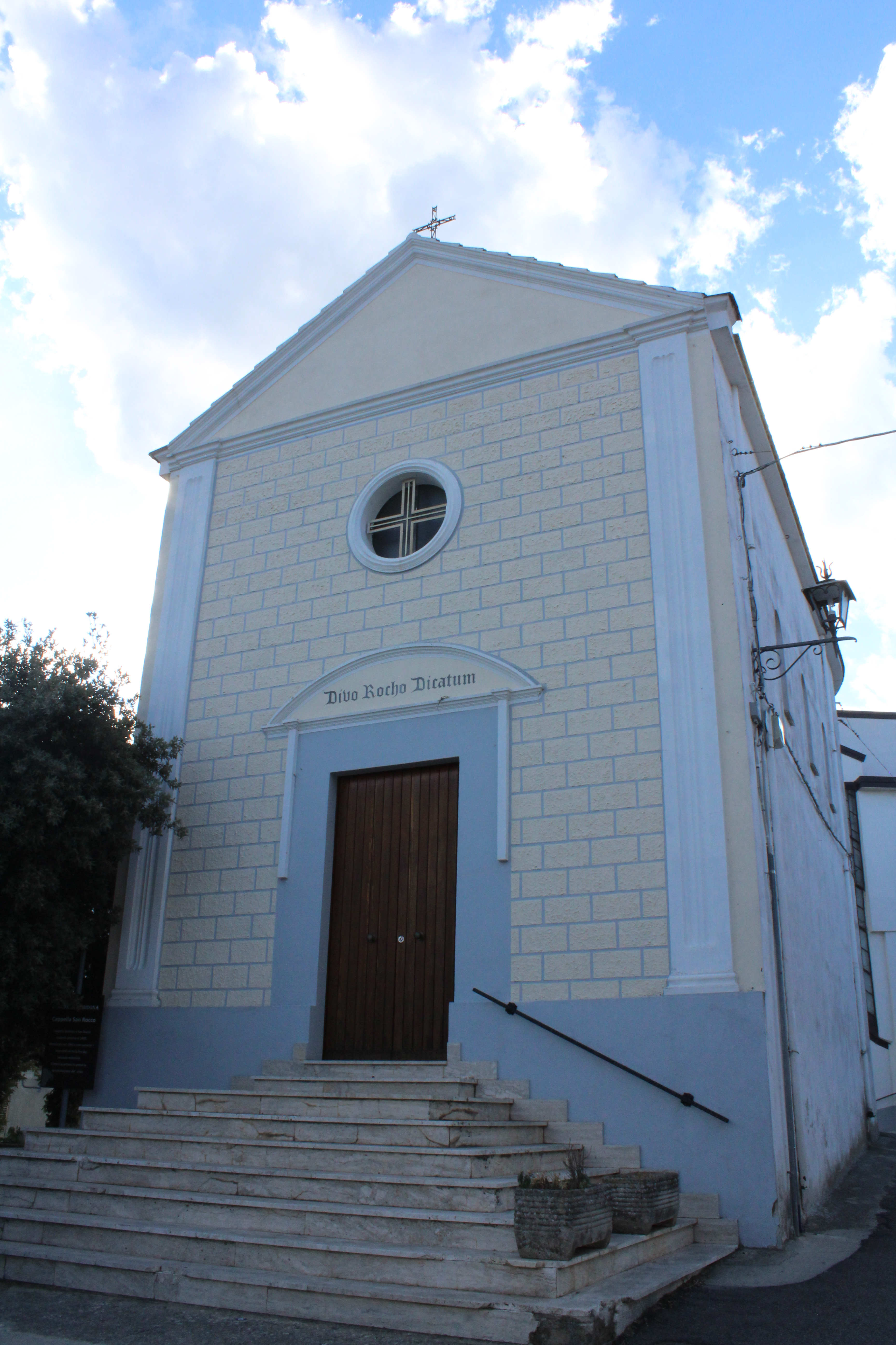 Chiesa di San Rocco (Albidona).